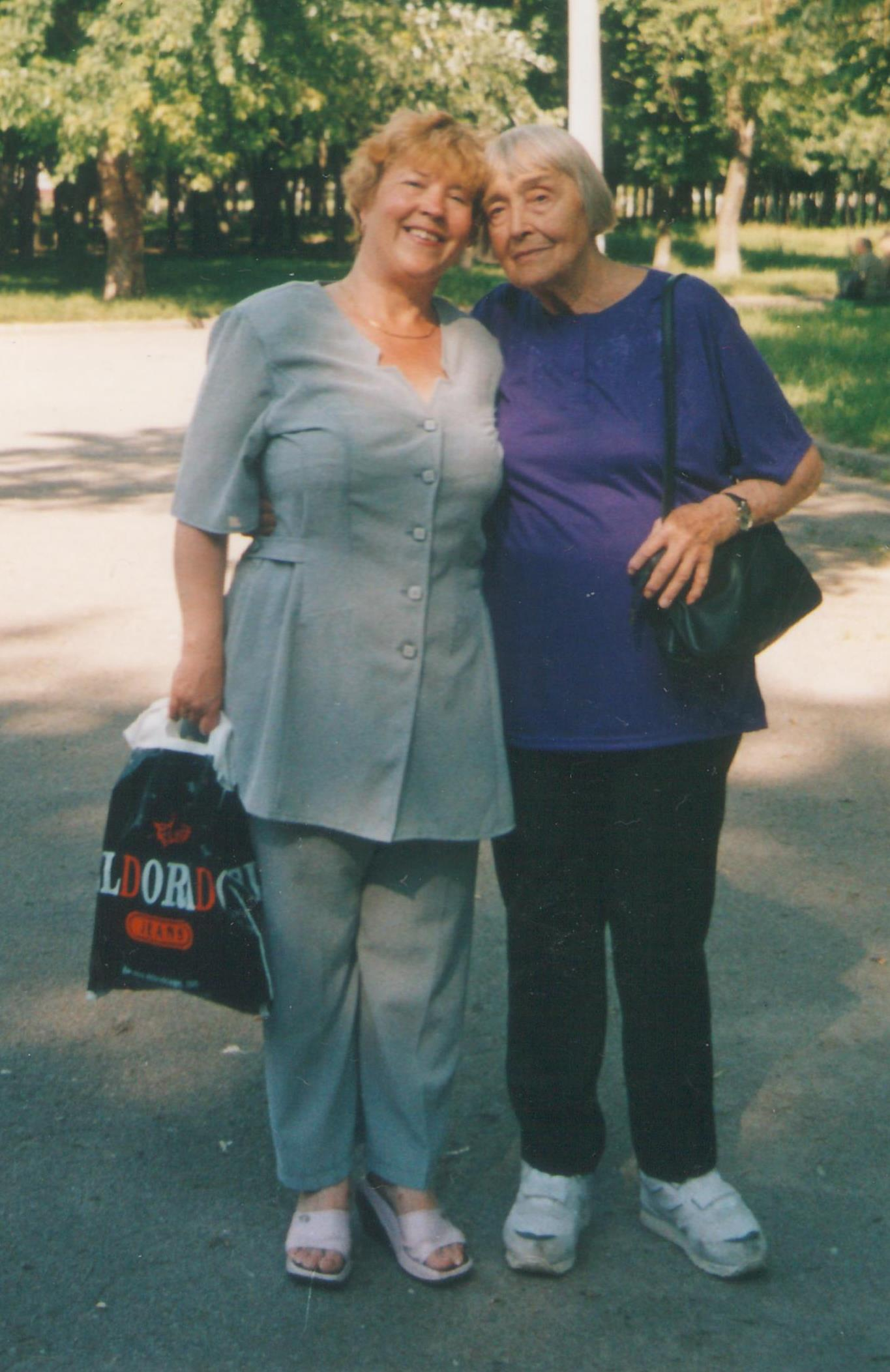 Главный редактор журнала "К здоровью через культуру" Бобина Людмила Анатольевна (слева) и поэтесса Ауновская Ольга Константиновна